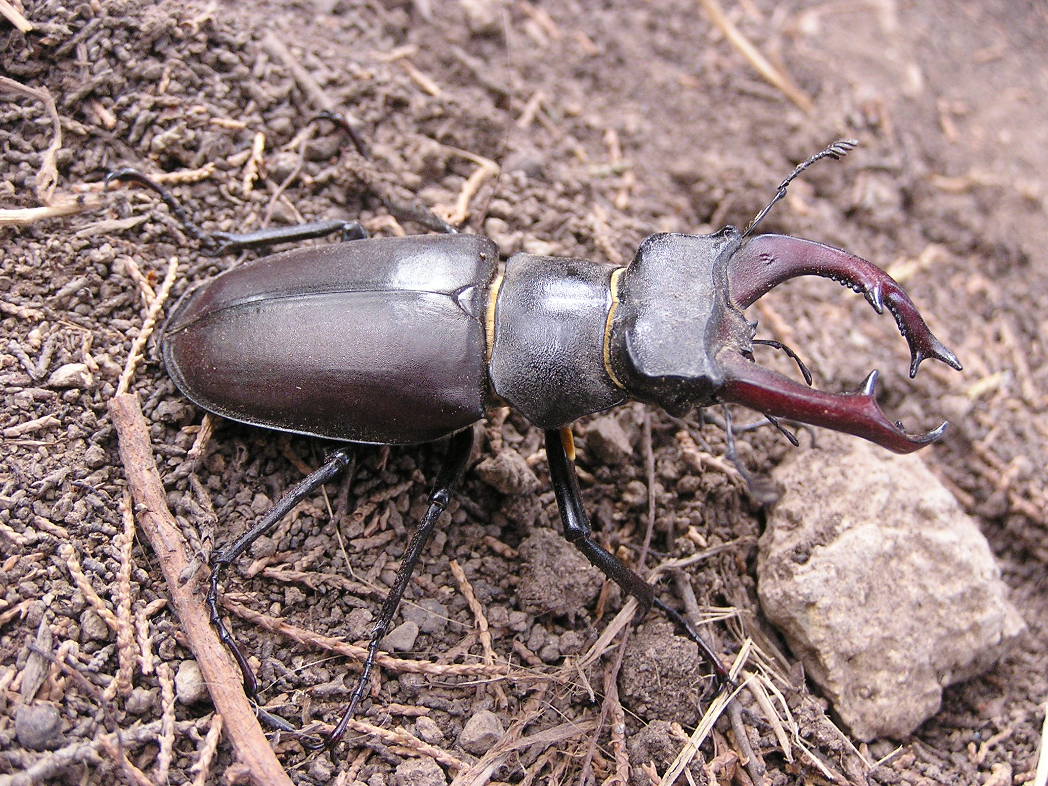 Lucanus cervus